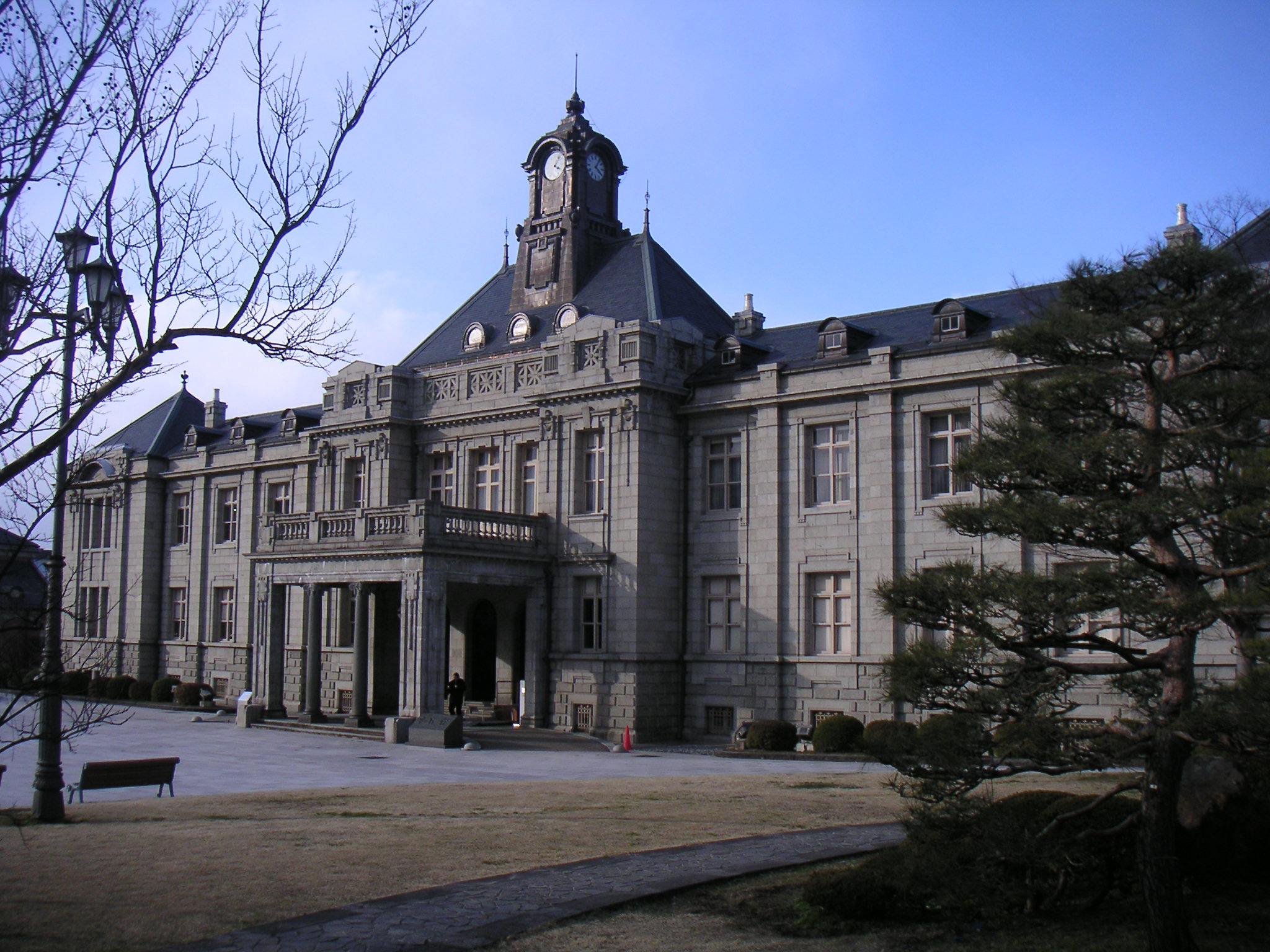 山形県文翔館